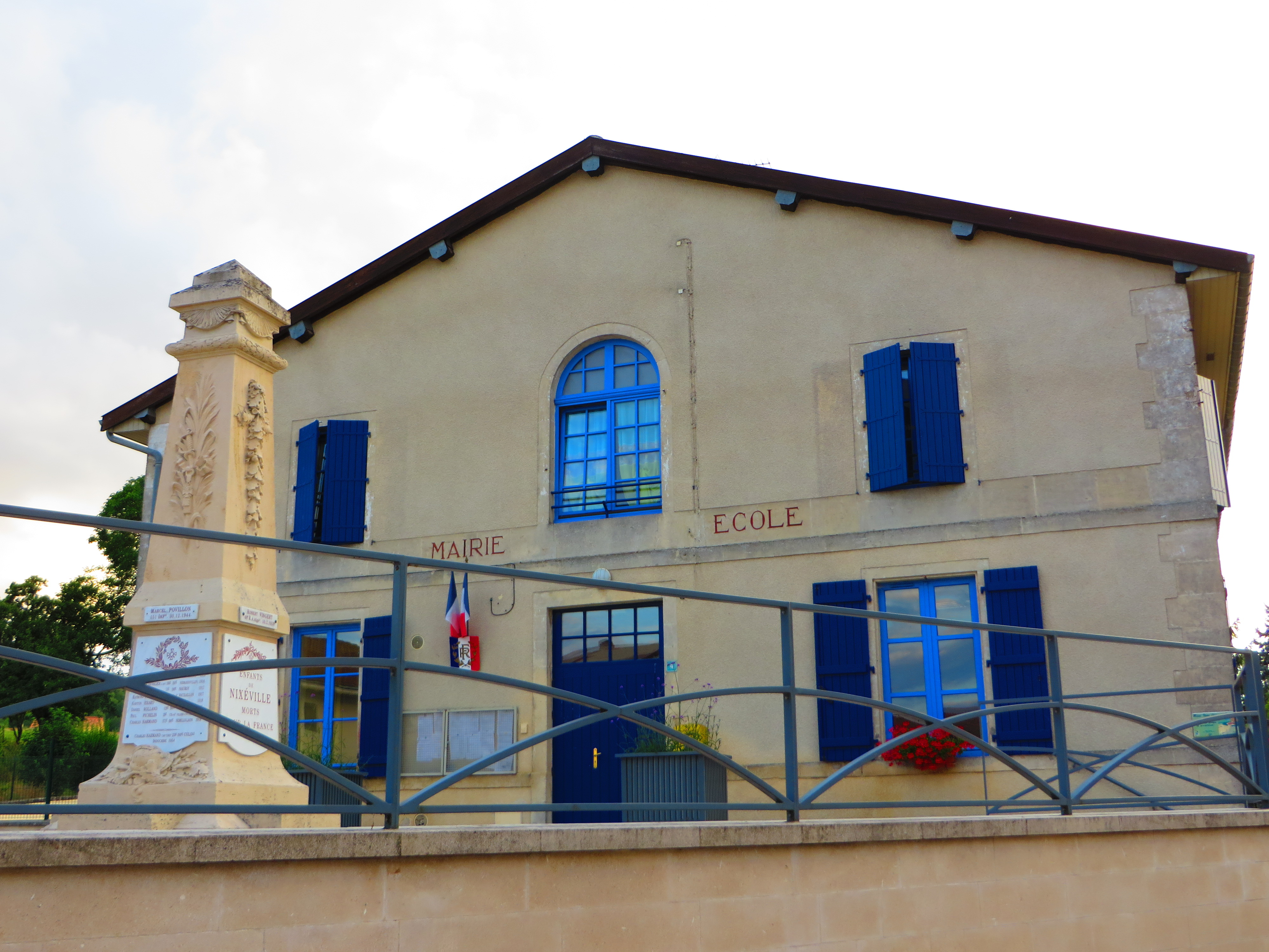 Nixéville-Blercourt La mairie